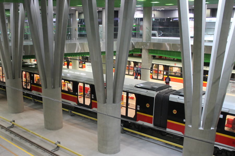 Peron linii M2 stacji C14 Stadion Narodowy widziany z antresoli.